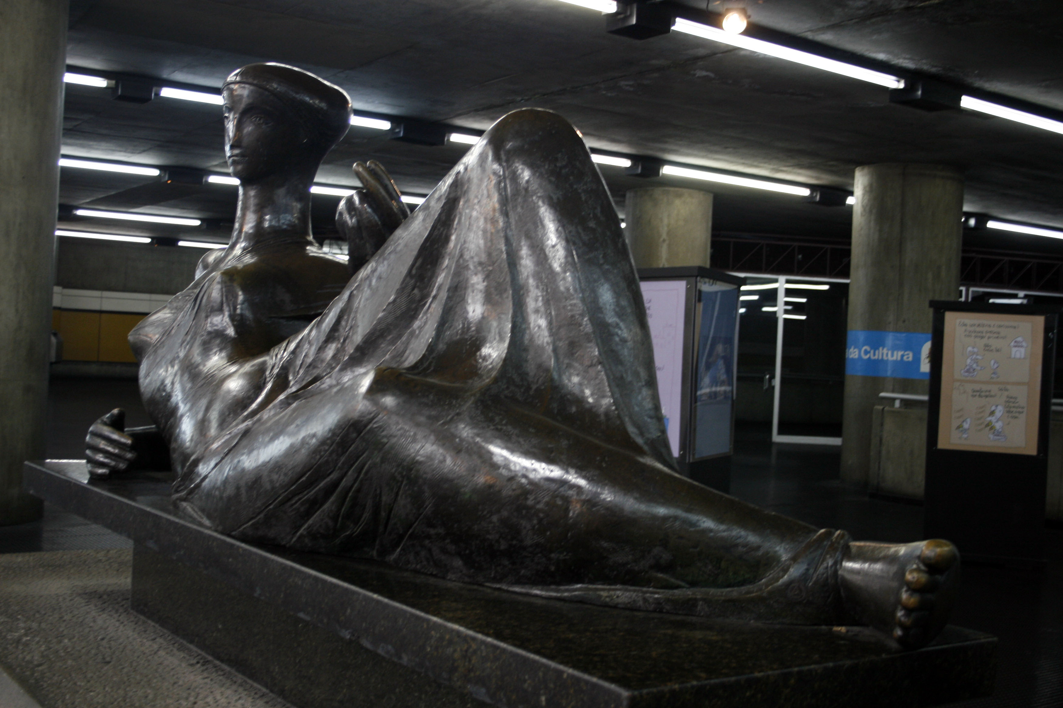 Estação de Metrô Sé - Mezanino central. Foto por André Deak para o Arte Fora do Museu (